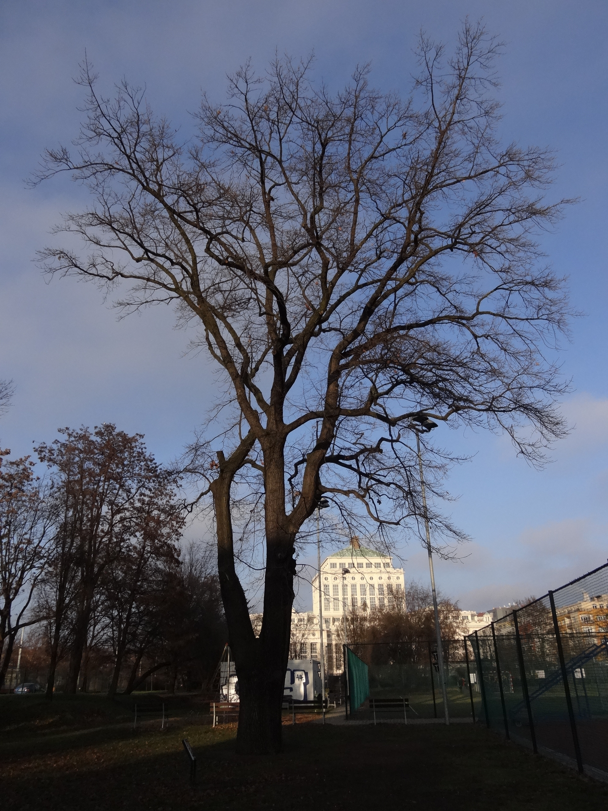 Praha-Podolí - památný dub letní v areálu sportoviště u sokolovny